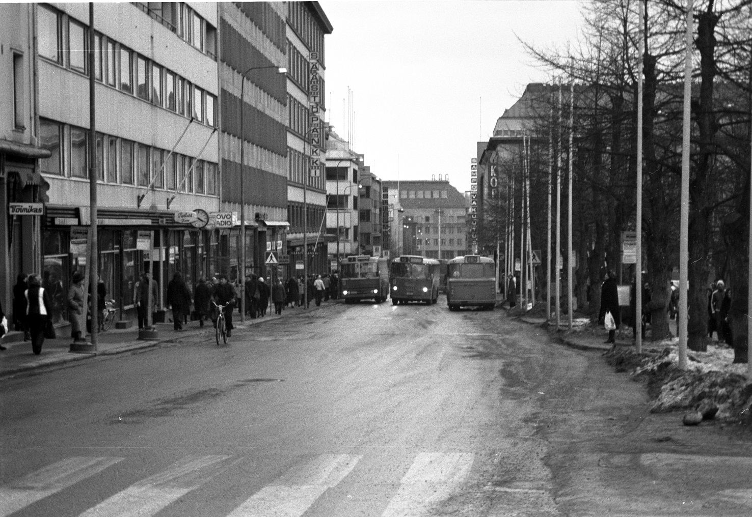 Busseja Jyväskylän Kauppakadulla Kirkkopuiston luona maaliskuussa 1979